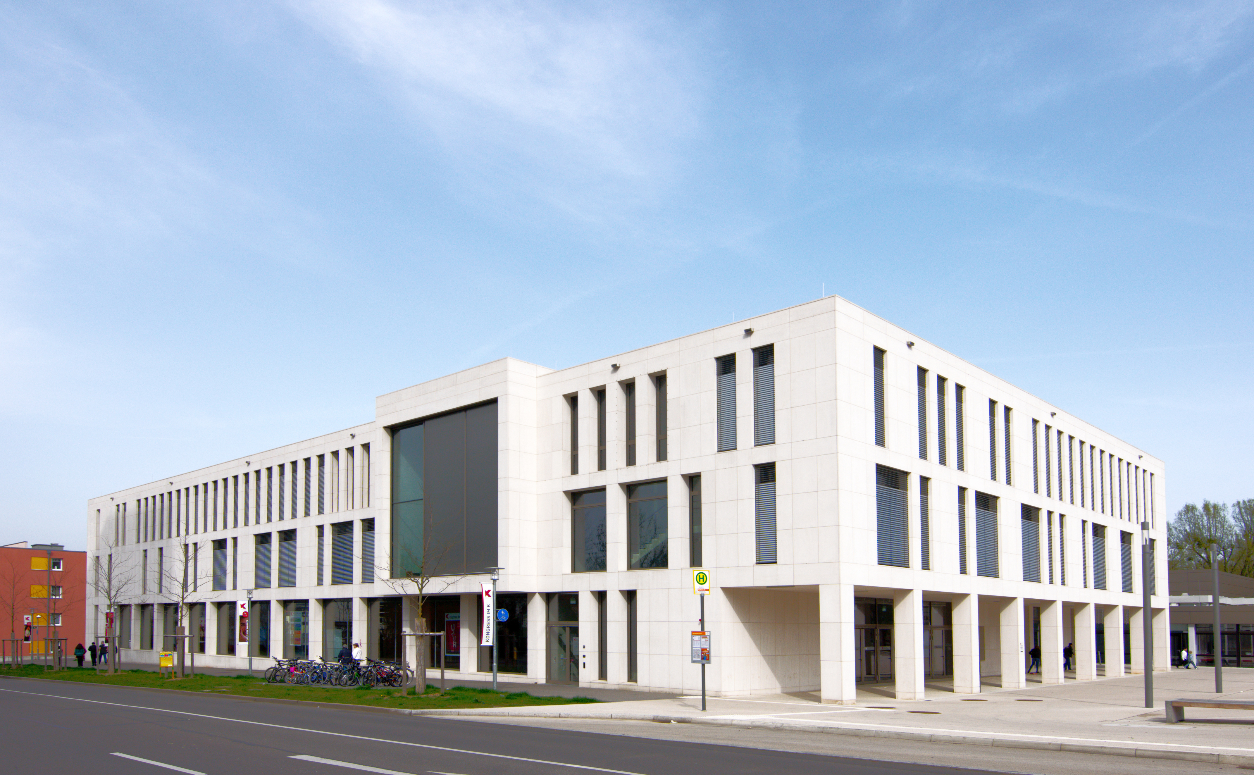 Das K – Kultur- und Kongresszentrum, Kornwestheim